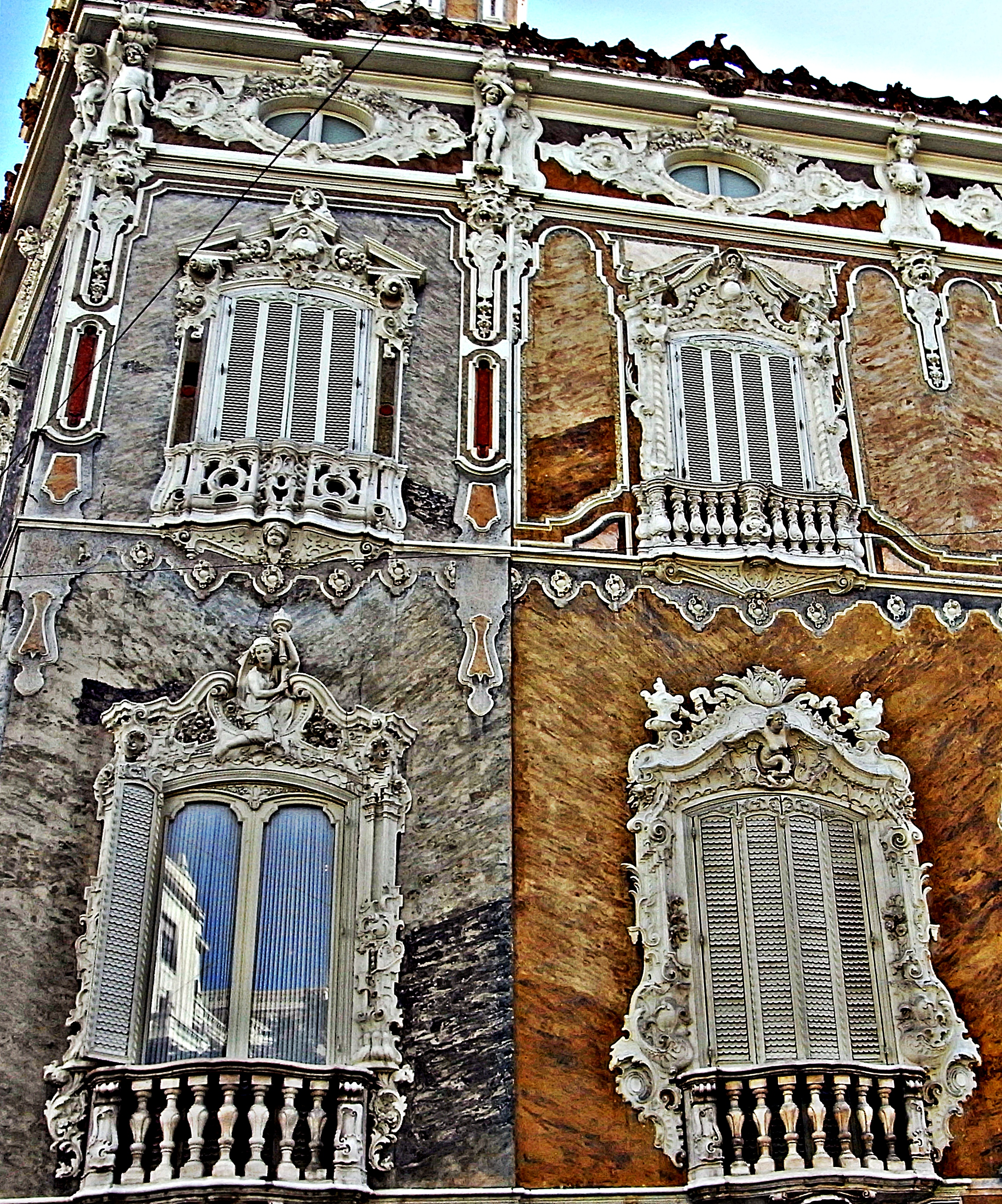 Palau del Marqués de Dosaigües (València)